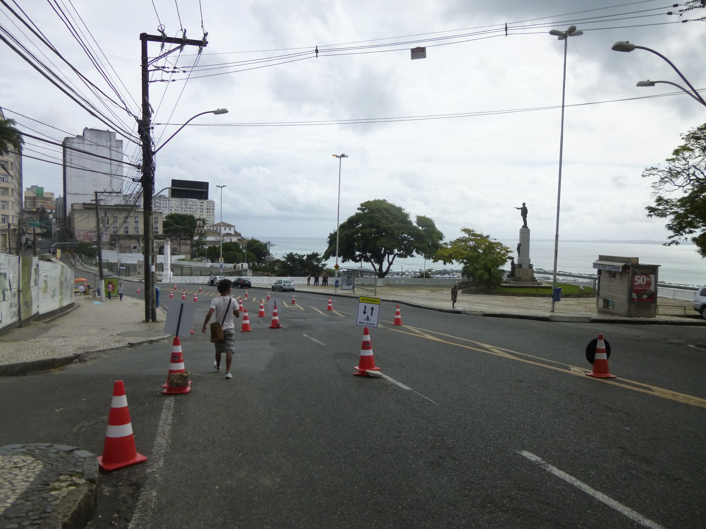 Sonn- und Feiertags eingerichteter Fahrradweg am Castro Alves Platz